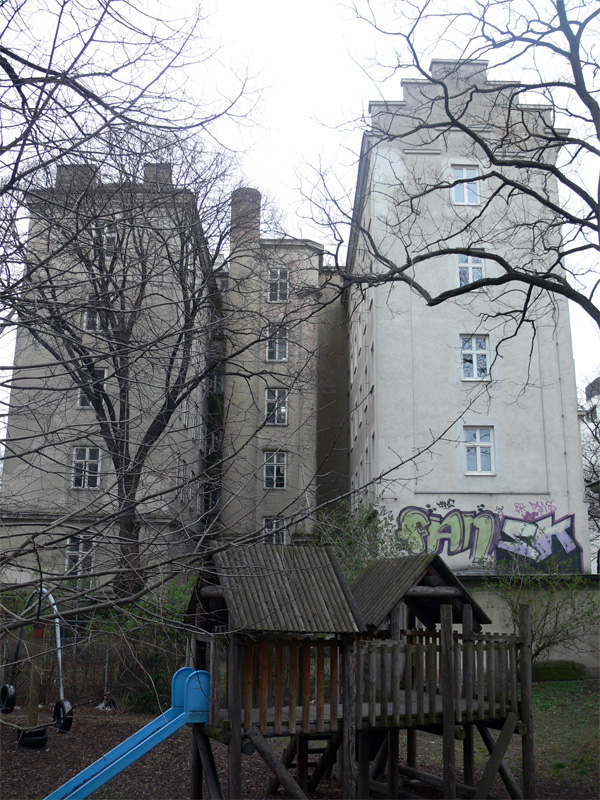 Männerwohnheim Meldemannstraße 27, Wien, Österreich